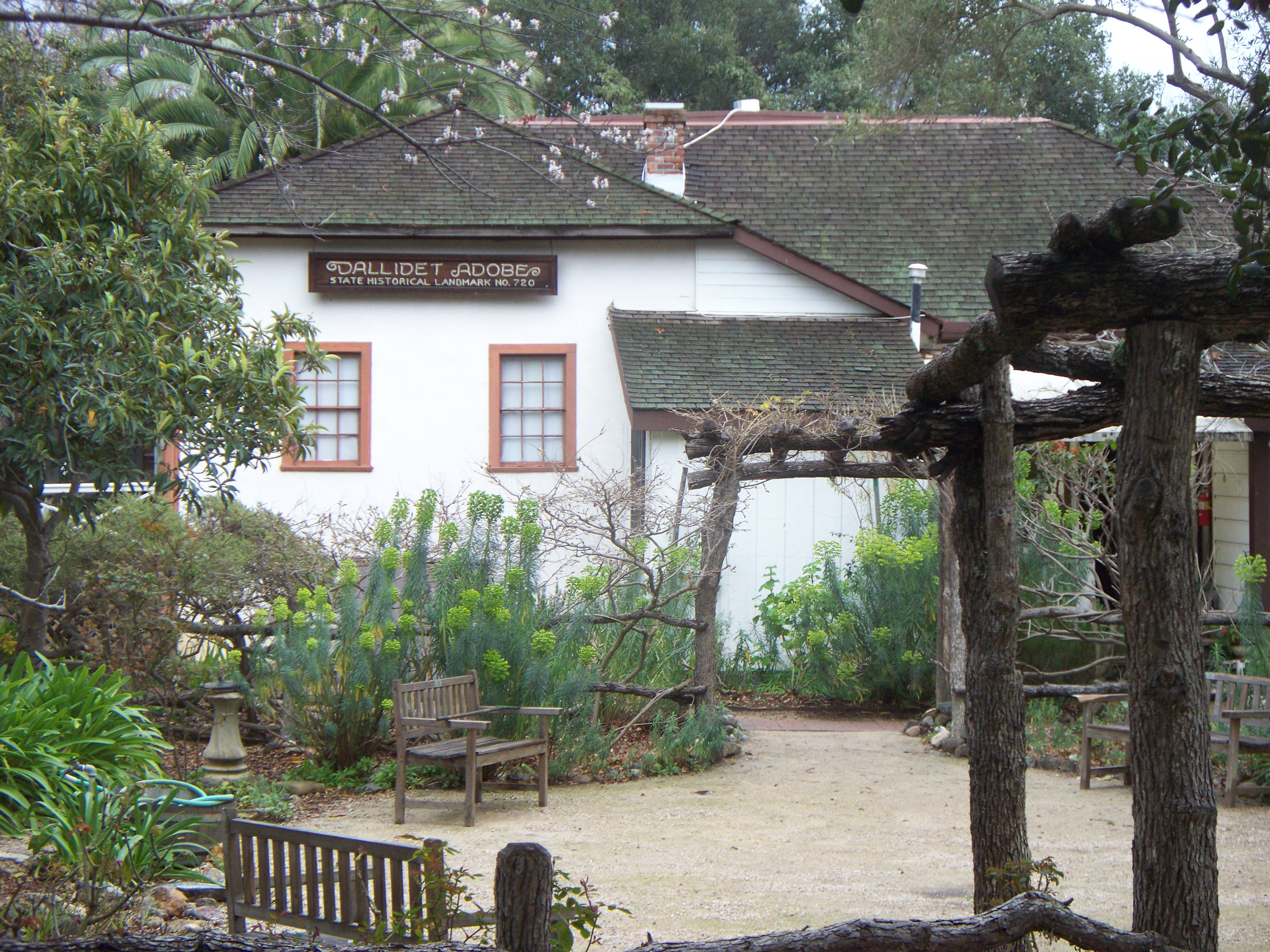 Dallidet Adobe CHL#720